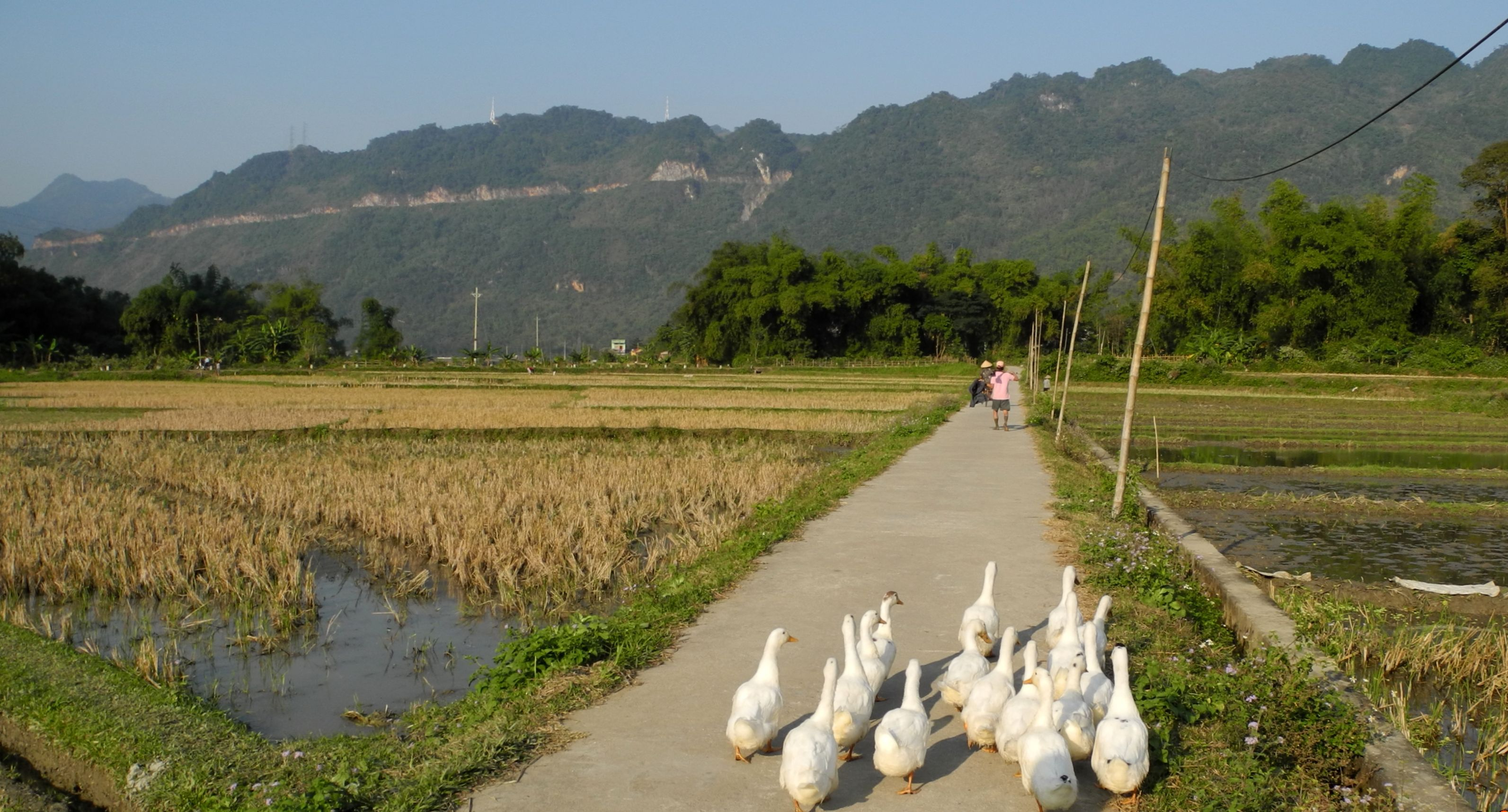 Mai Chau-Entenschar, Reisfelder